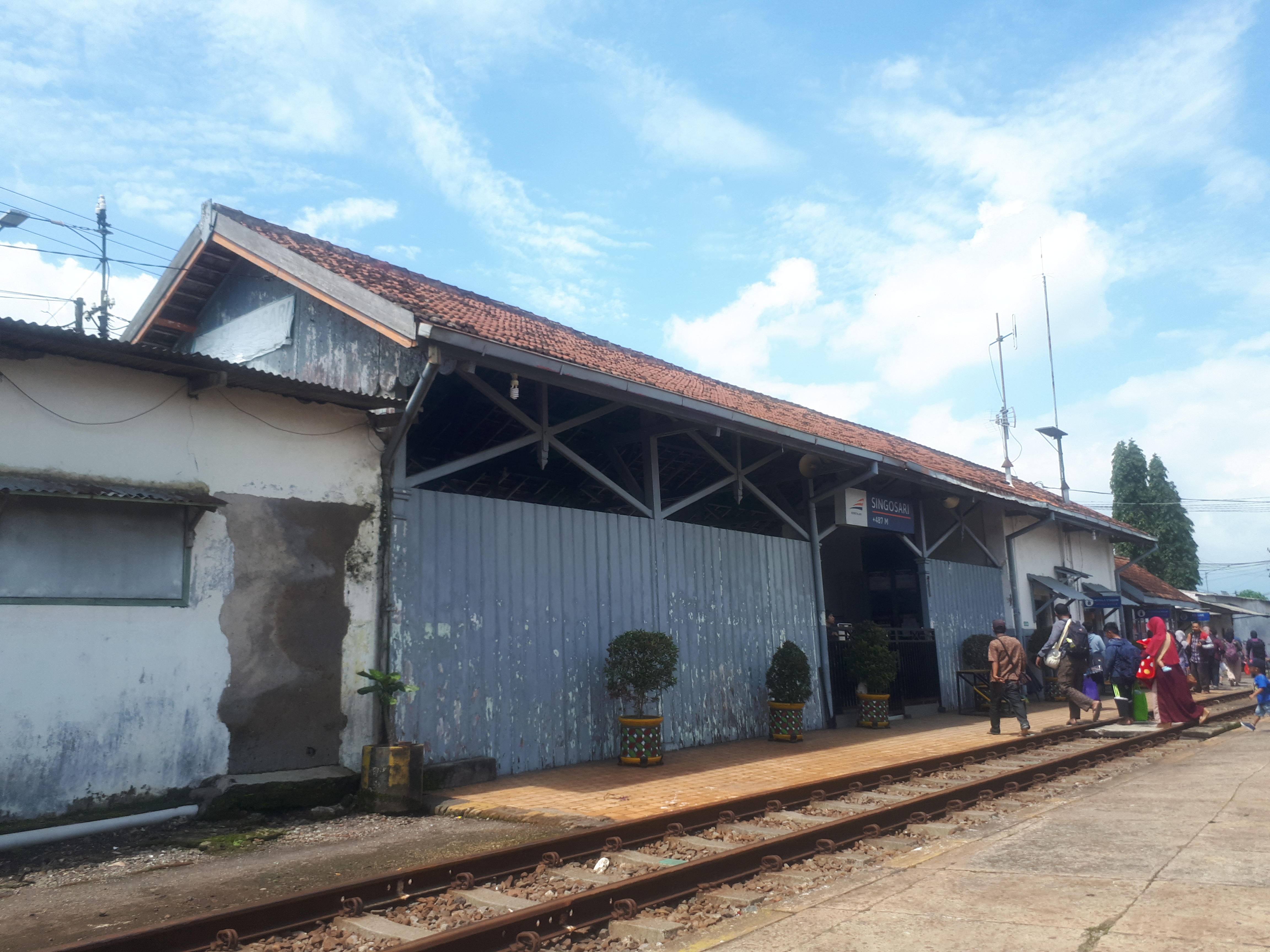 Stasiun Singasari pada tahun 2020